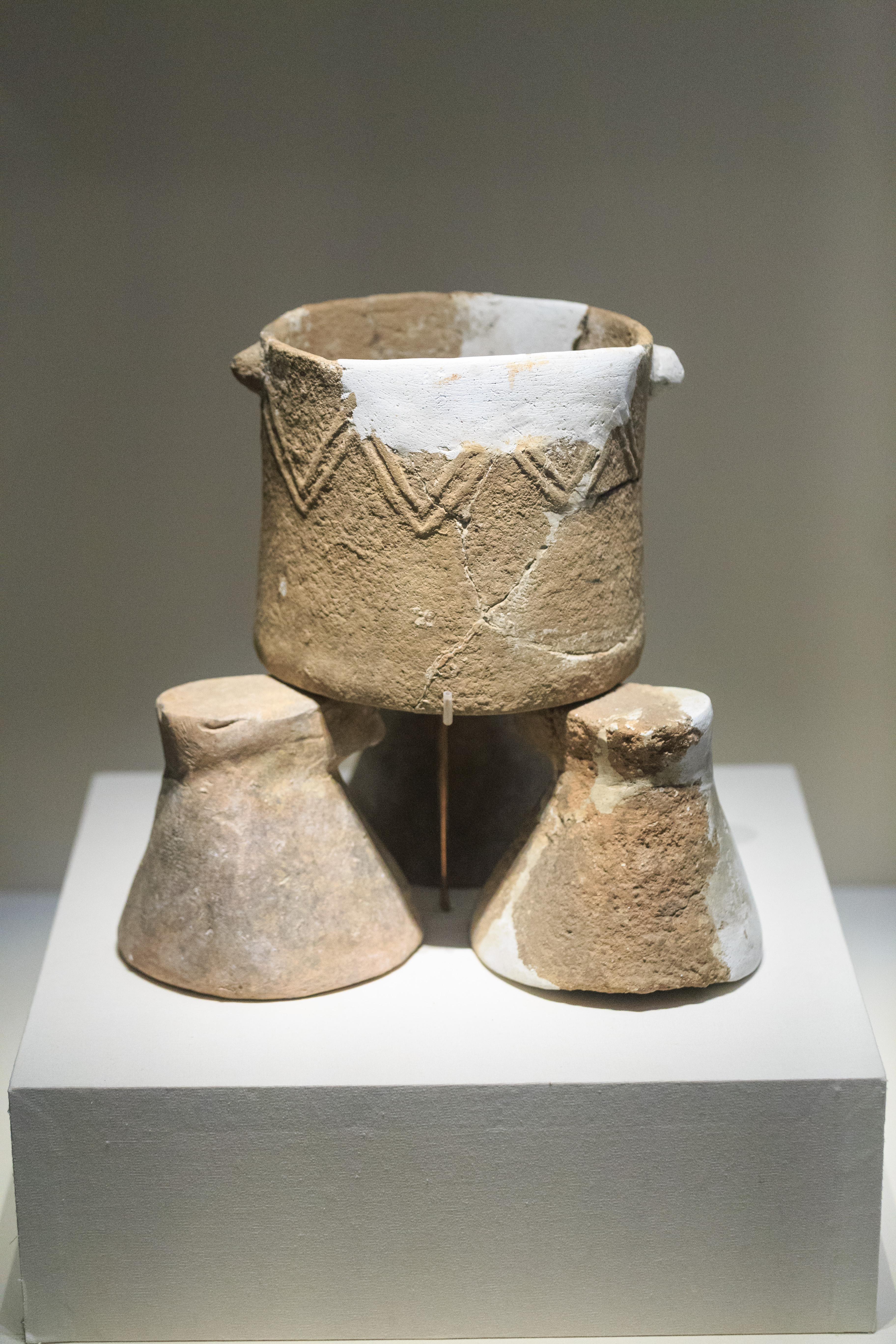 中国国家博物馆—— 陶釜、陶支脚，磁山文化（约公元前6100-前5600年），1977年河北武安磁山出土